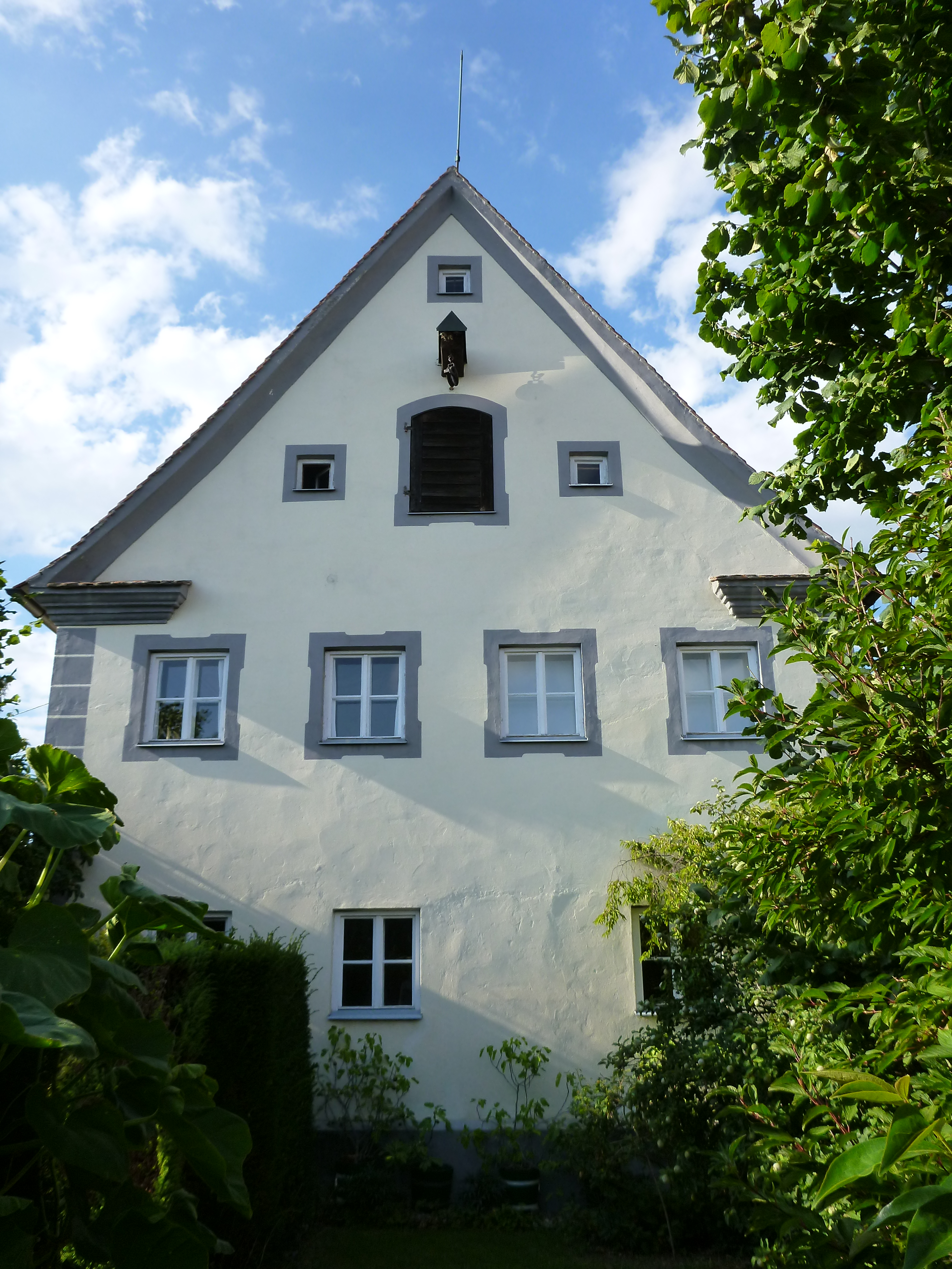 Pfarrhaus Allmannshofen, Satteldachbau, 1. Drittel 18. Jahrhundert; Pfarrstadel, 1. Hälfte 18. Jahrhundert